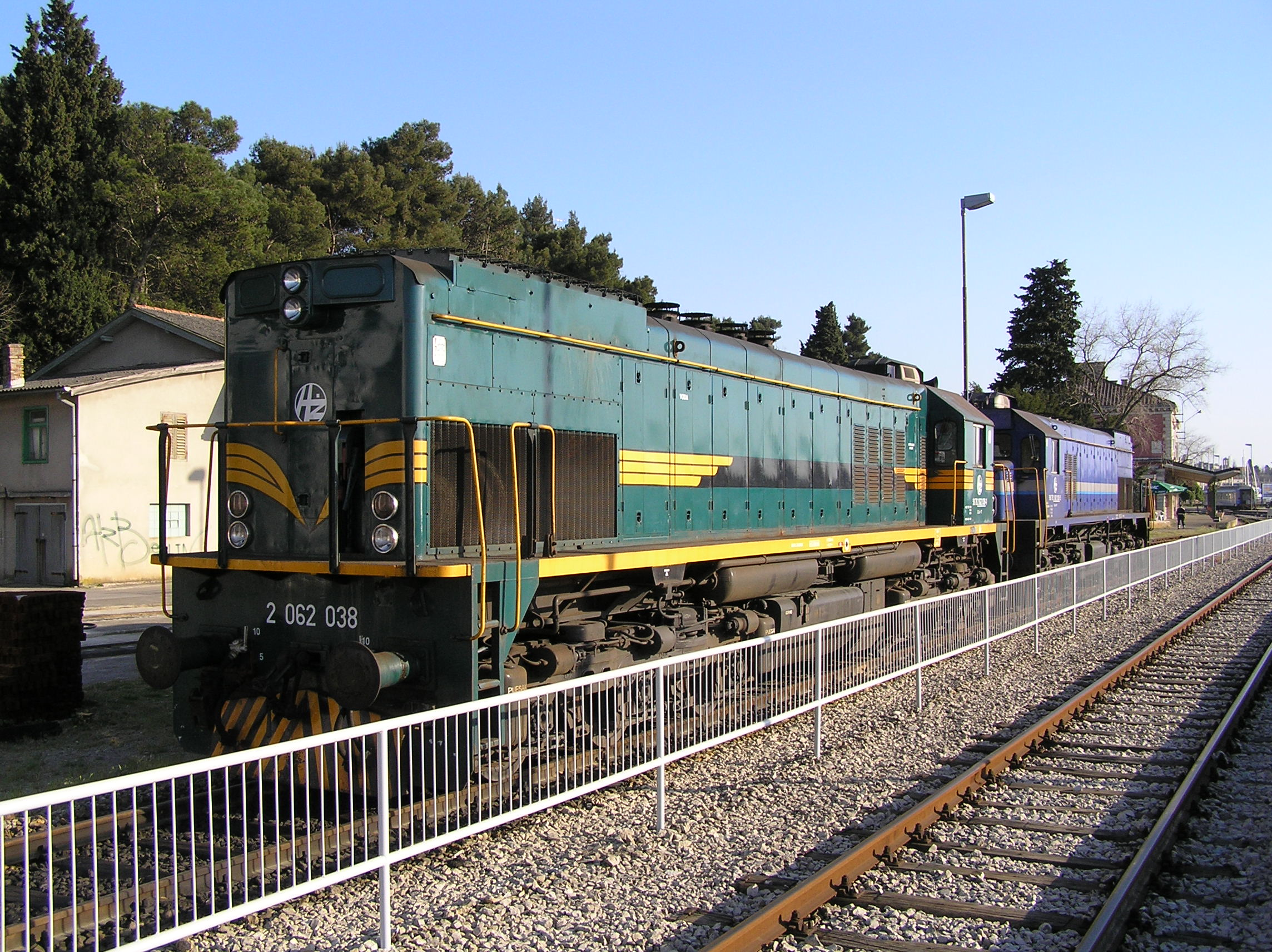 2062 series locomotives in Pula, Croatia self-made